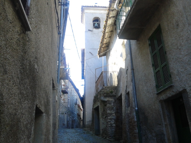 Scorcio del borgo antico